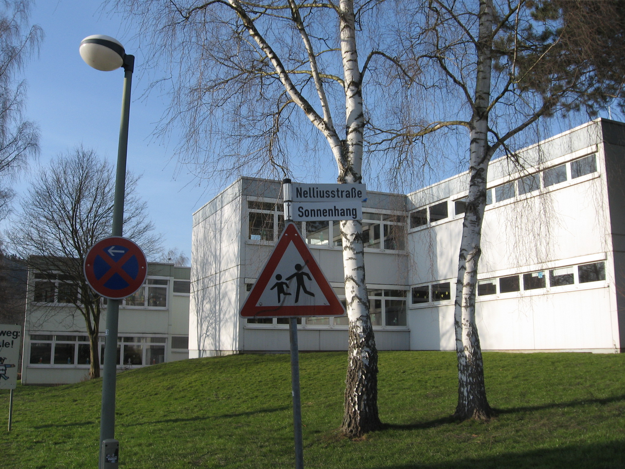 Straßenschild der Straße Sonnenhang in Sundern-Hachen nach der Umbenennung. Das Schild des früheren Namens Nelliusstraße hängt noch. Ein blaues Klebeband welches auf dem Namen Nelliusstraße hindurchging wurde abgerissen.